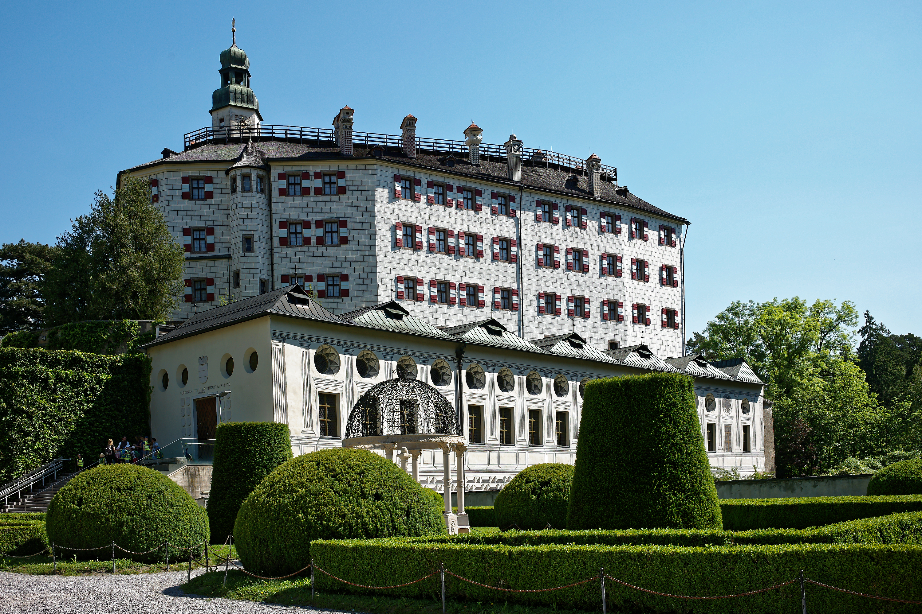 Schlossanlage und Garten von Ambras, aussen